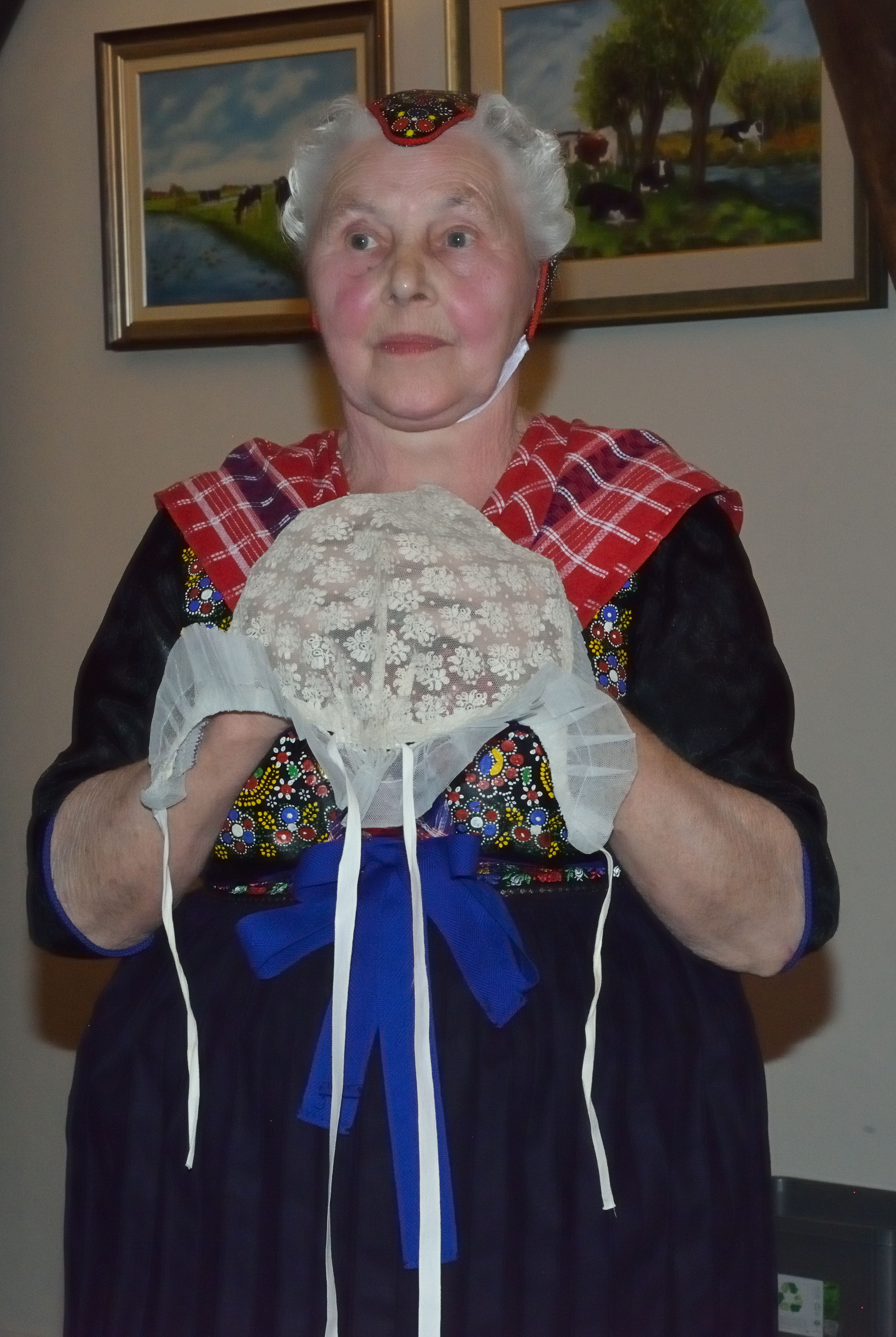 Staphorster klederdracht